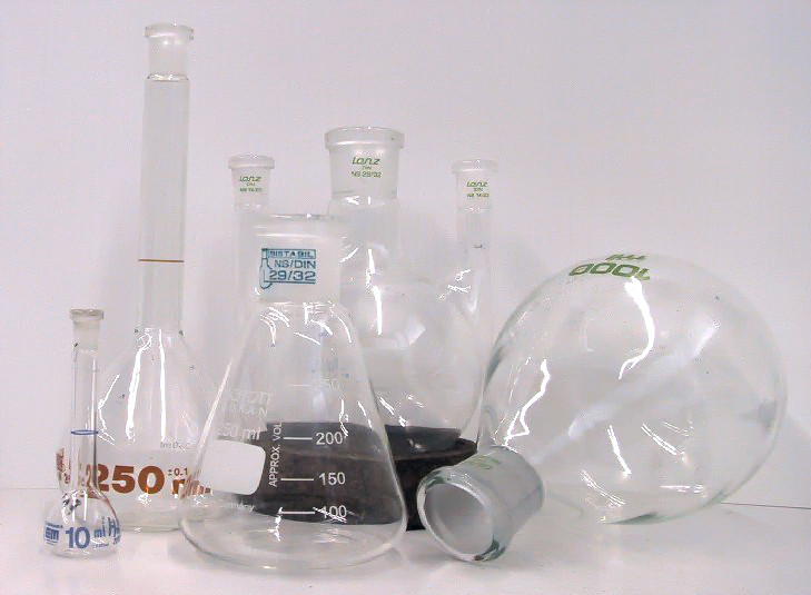 Chemical flasks Description in de wikipedia Beschreibung: Glaskolben für die Chemie Fotograf oder Zeichner: -grimbart- Lizenzstatus: GNU FDL